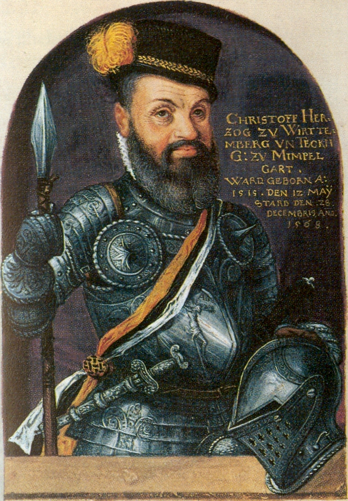 Herzog Christoph von Württemberg Pergamenthandschrift, Grisaille, Deckfarben eingescannt aus: Die Renaissance im deutschen Südwesten zwischen Reformation und Dreißigjährigem Krieg. Eine Ausstellung des Landes Baden-Württemberg, Heidelberger Schloss, 21. Juni - 19 Oktober 1986